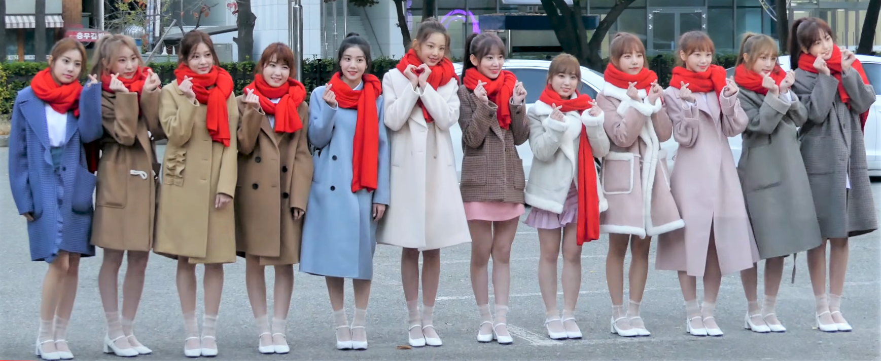 11월 2일 오전 서울시 영등포구 여의도 KBS 신관 공개홀에 KBS ‘뮤직뱅크(MUSICBANK)’ 리허설을 위해 아이돌이 출근을 하고 있다.